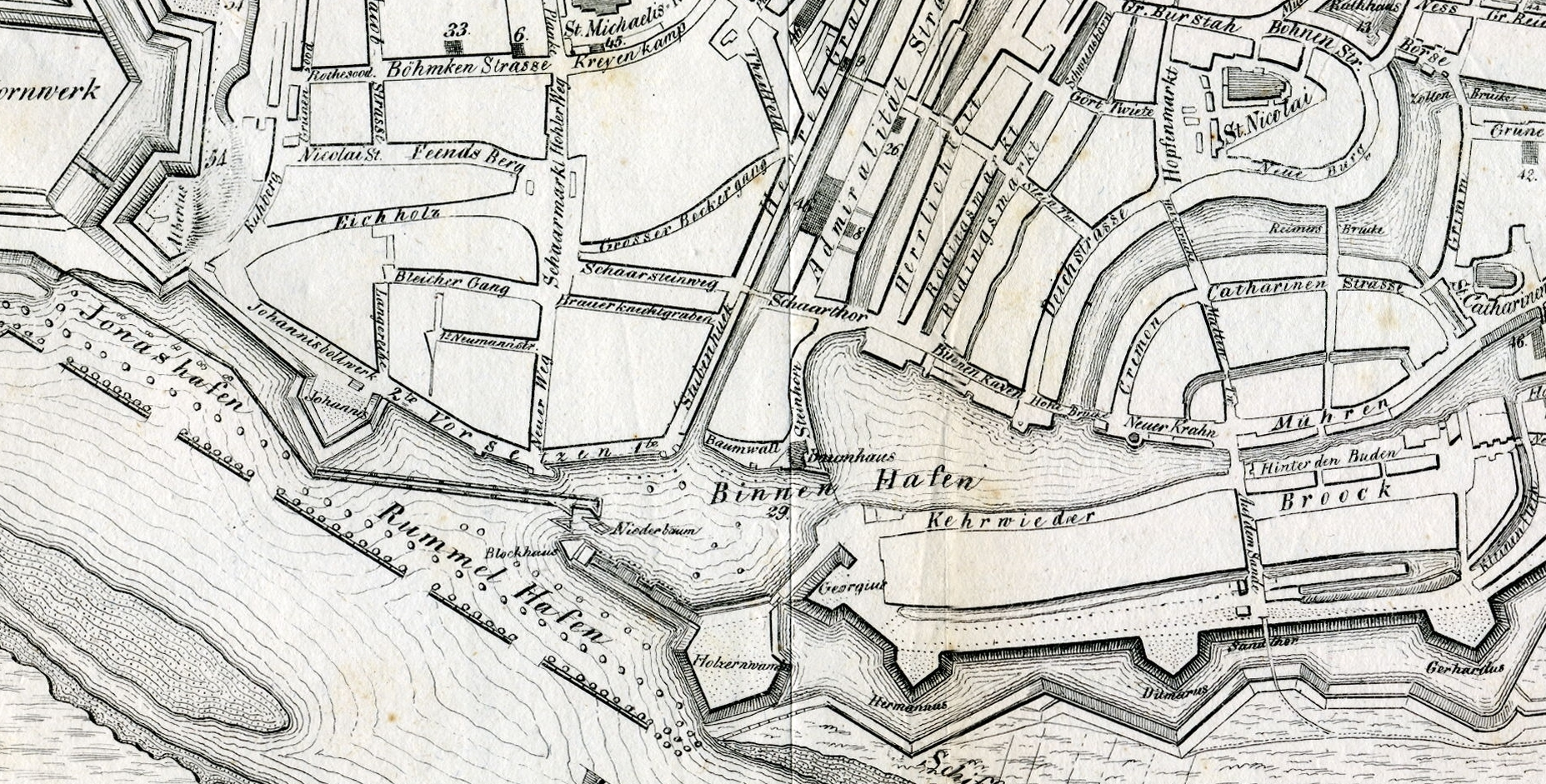 Hafen und Elbe bei Hamburg 1813/1814